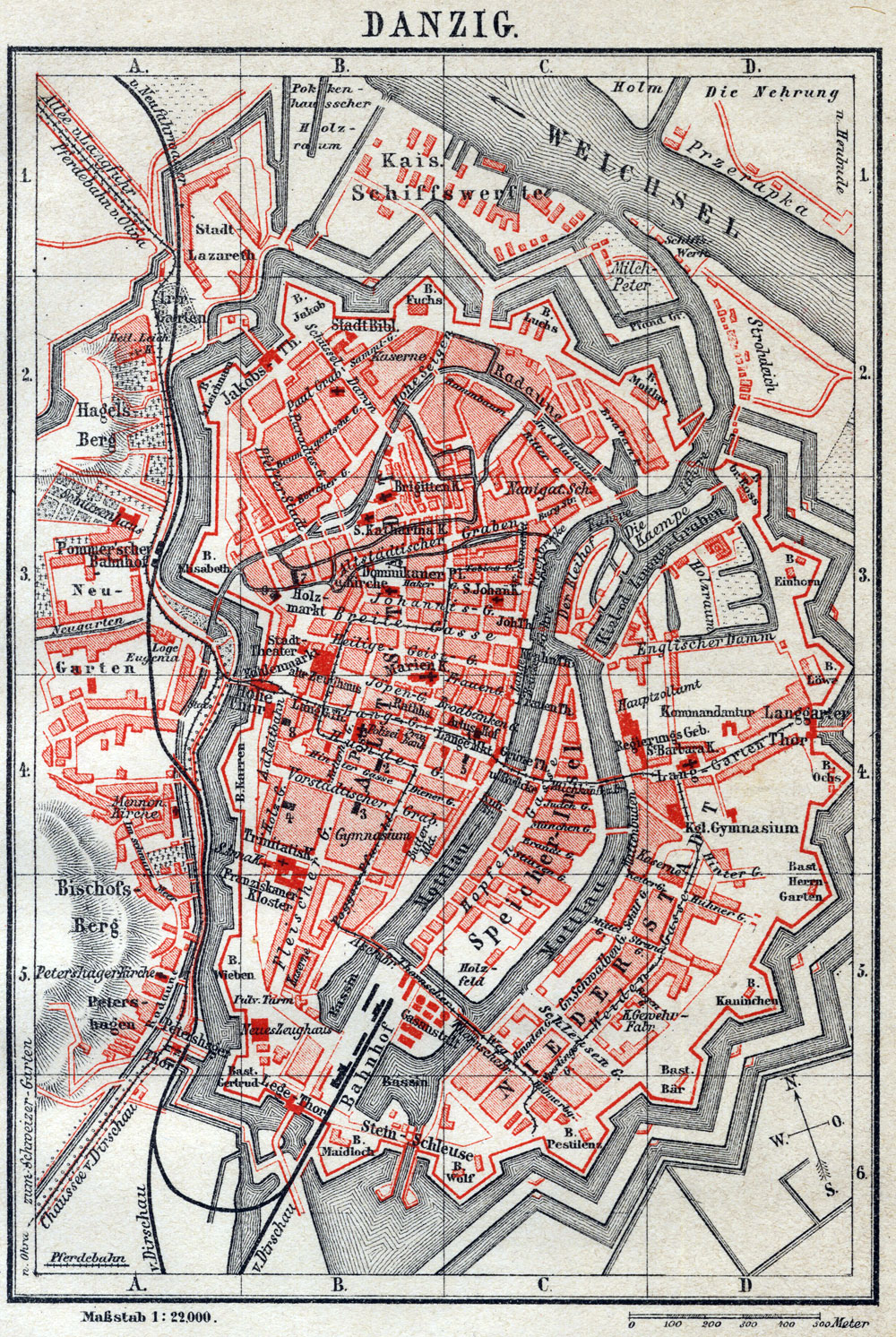 Plan Gdańska z 1885.